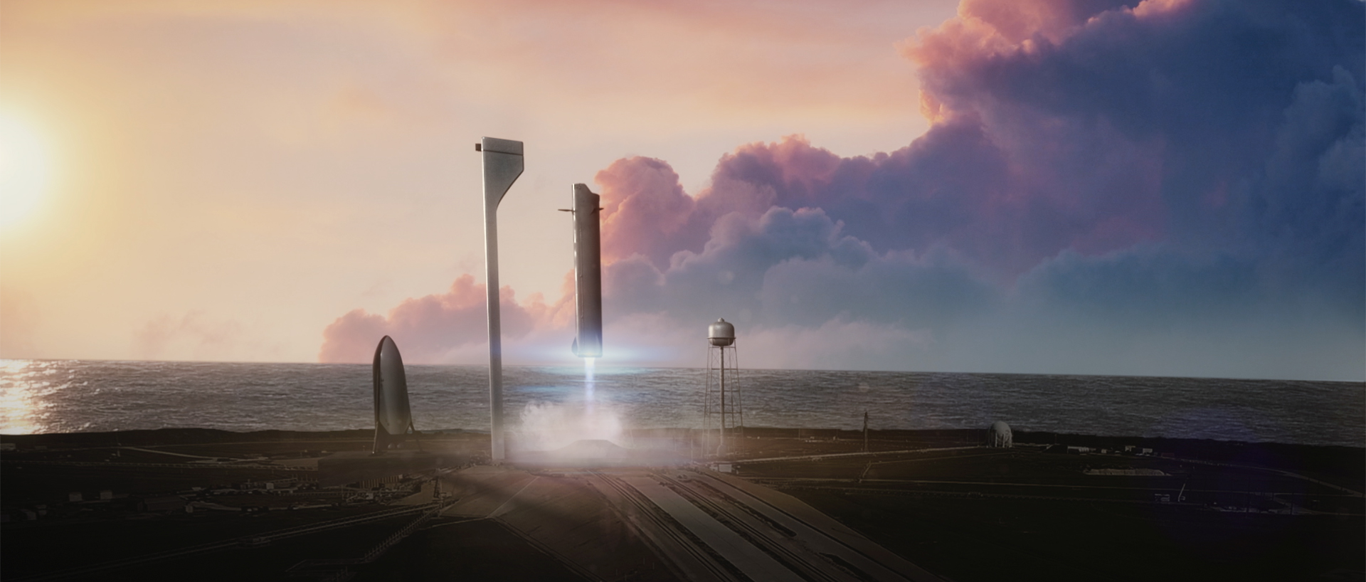 Interplanetary Transport System booster (ITS booster) landing